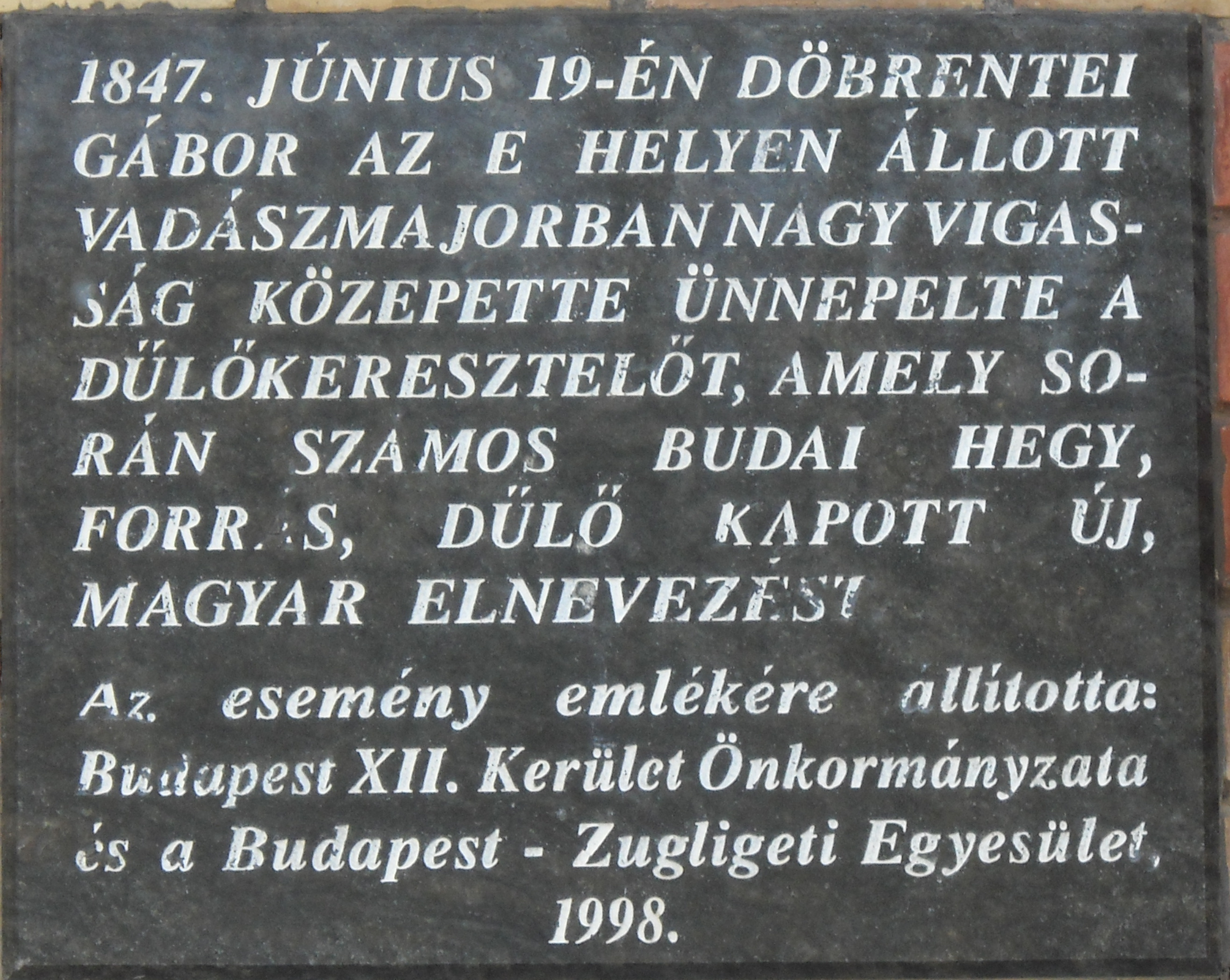 Döbrentei Gábor - magyar nevek (emléktábla), Budapest, XII., Zugligeti út 113.